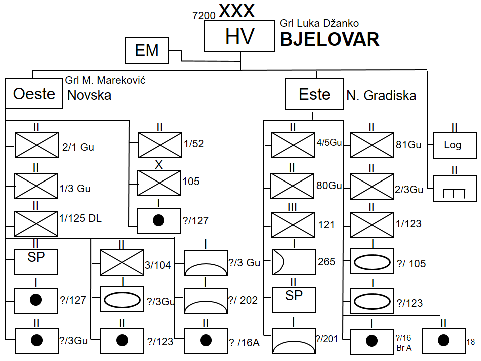 Elaborado sobre la base de: Elaborado sobre la base de: Brigović, Ivan; Martinić Jerčić, Natko; Radoš, Ivan (2015). «Vojno Re-darstvena Operacija Bljesak». Hrvatski memorijalno-dokumentacijski centar Domovinskog rata (en in-glés) (Zagreb). Consultado el 01 de septiembre de 2018 David C. Isby, Balkan Battlegrounds: A Military History of the Yugoslav Conflict, 1990-1995. Diane Publishing Compa-ny, 2002 y Početak vojno-redarstvene operacije "Bljesak" disponible en Directive Op Nr 5/94 For Carring Out Op Flash. Libro Sve Moje Bitke (All My Battles), Gen Janko BOBETKO. Zagreb 1996. Pag 396. Documento ICTY SVE MOJE BITKE - EX-CERPTS.doc/ljv. Brigovic, I., Martinic, N. and Rados, I. (2018). Hrvatski Vojnik. [online] Hrvatski-vojnik.hr. Available at: [Accessed 1 Aug. 2018].